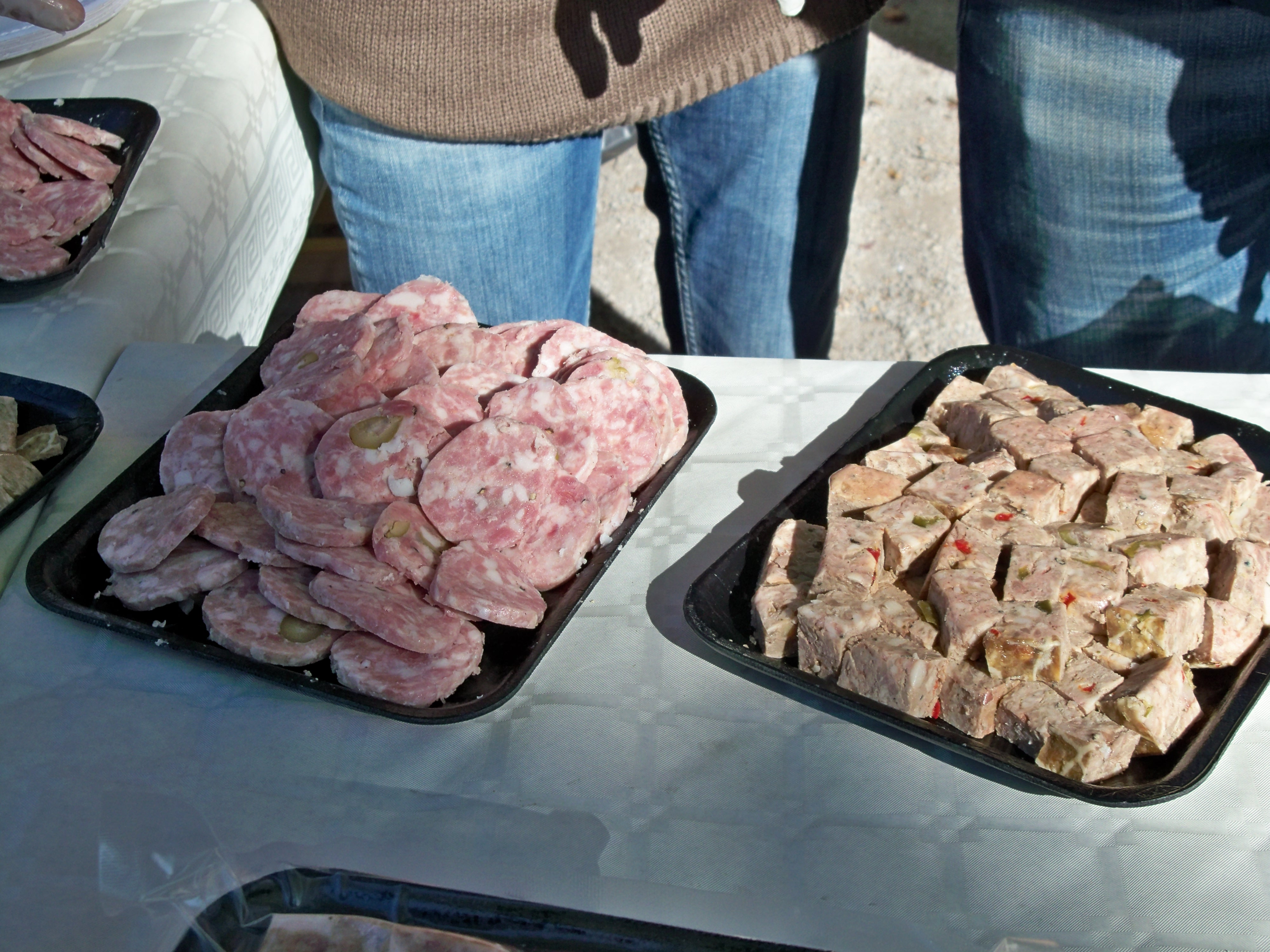 Charcuterie à base de porc du Ventoux